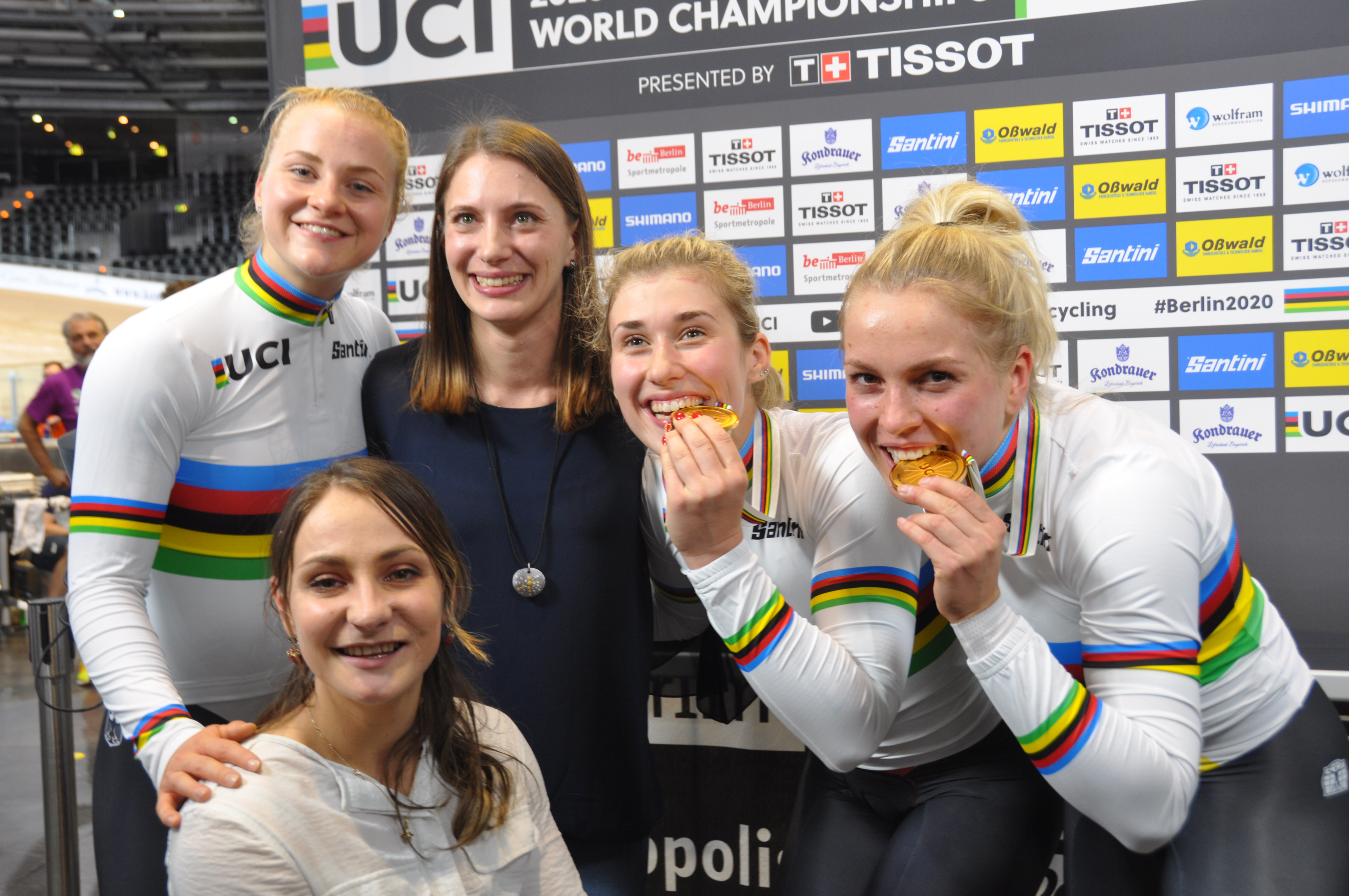 V.l.n.r.: Lea Sophie Friedrich, Miriam Welte, Pauline Grabosch, Emma Hinze, vorne Kristina Vogel